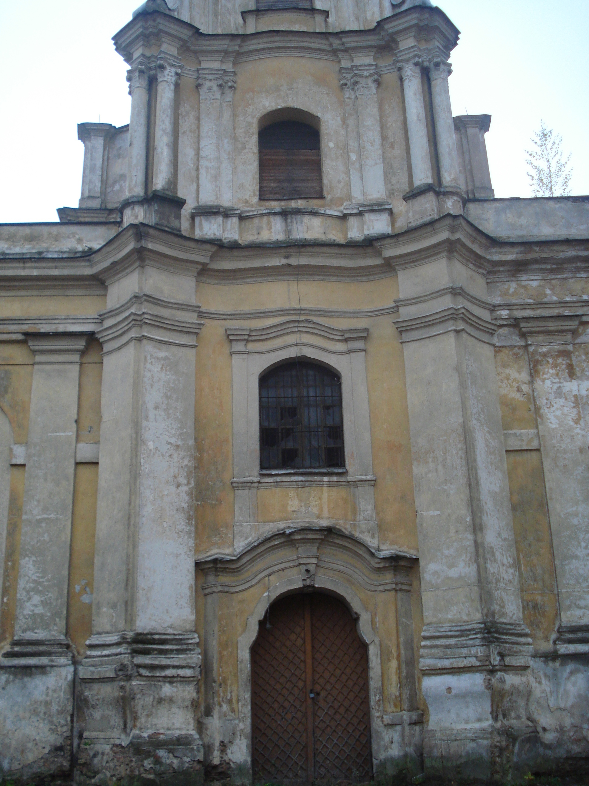 Church of Blessed Virgin Mary (Švč. Mergelės Marijos Ramintojos bažnyčia) in Vilnius (Savičiaus g. 13/2). Portal